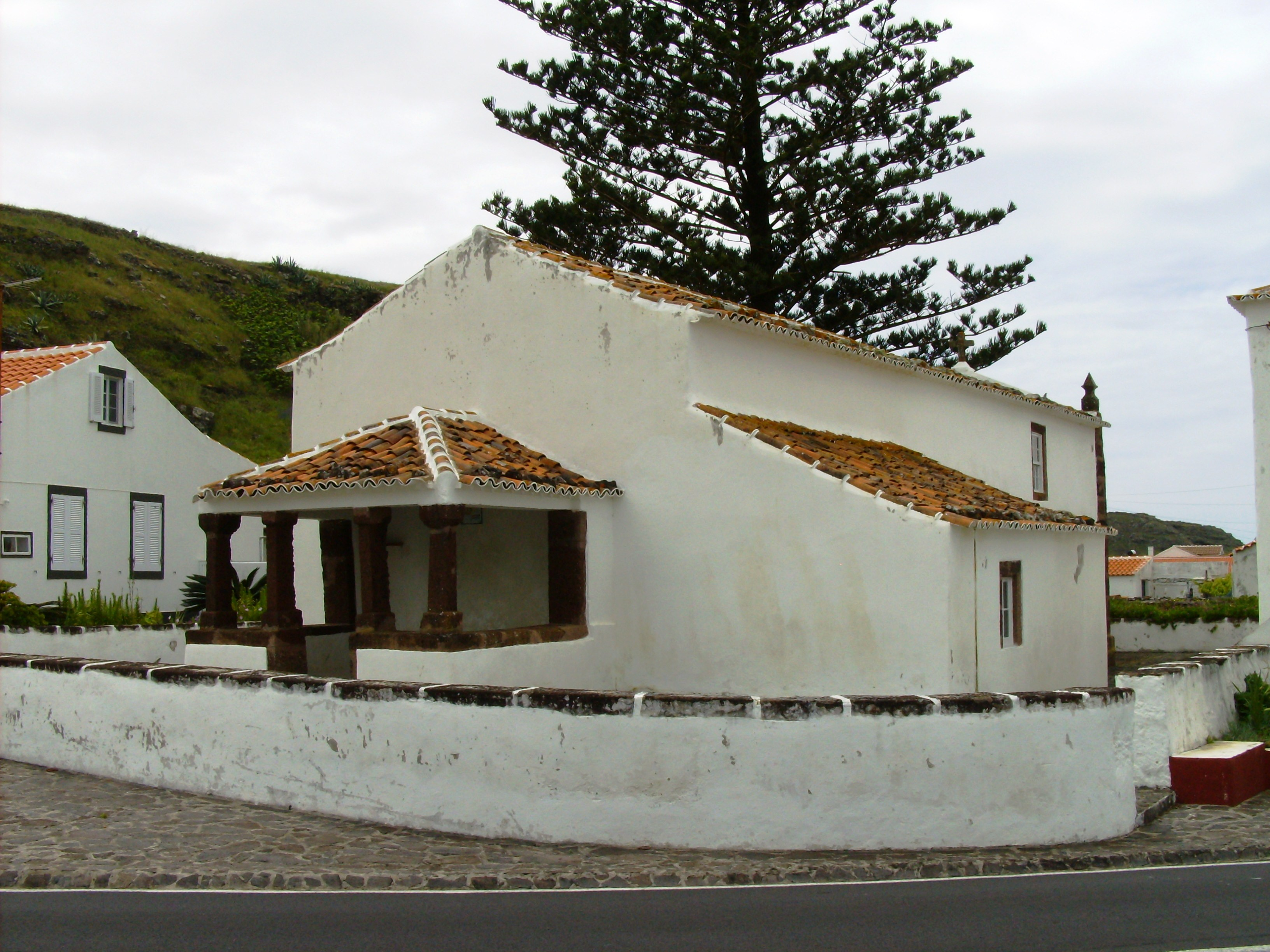 Ermida de Nossa Senhora dos Anjos, Ilha de Santa Maria (Açores), Portugal.